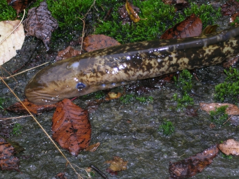 Petromyzon marinus Foto Joel Berglund Foto på havsnejonöga från Sköldsån som mynnar i Göta älv.